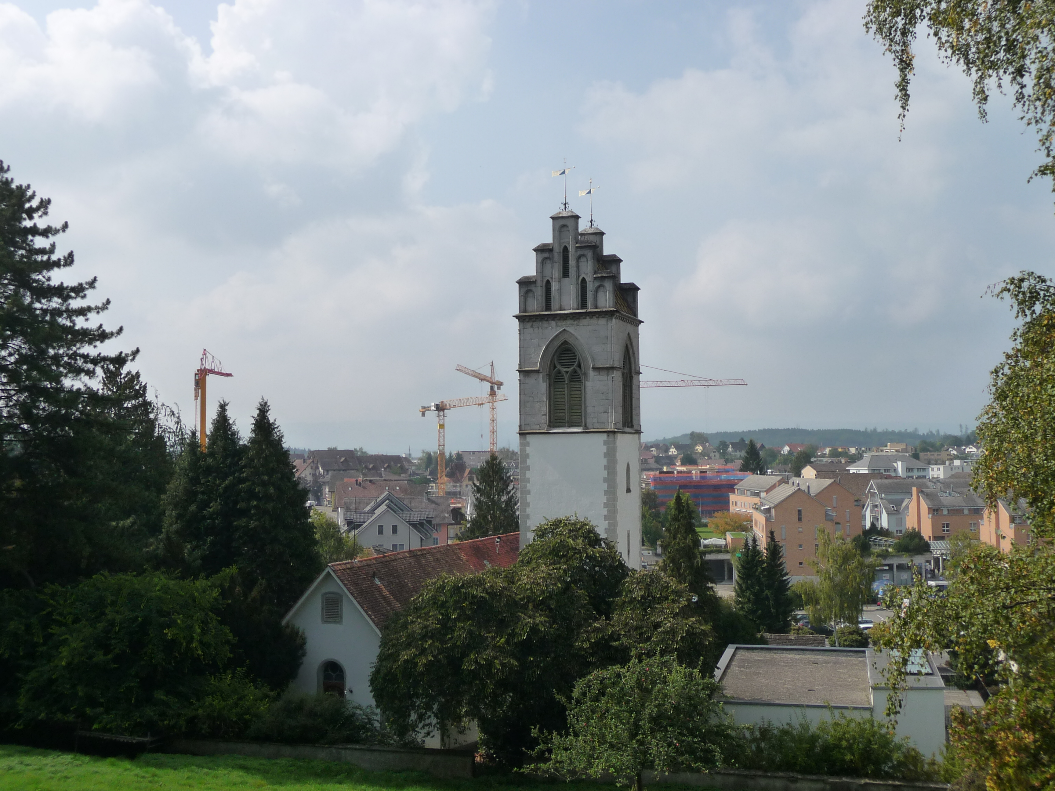 Kirche in Affoltern am Albis.